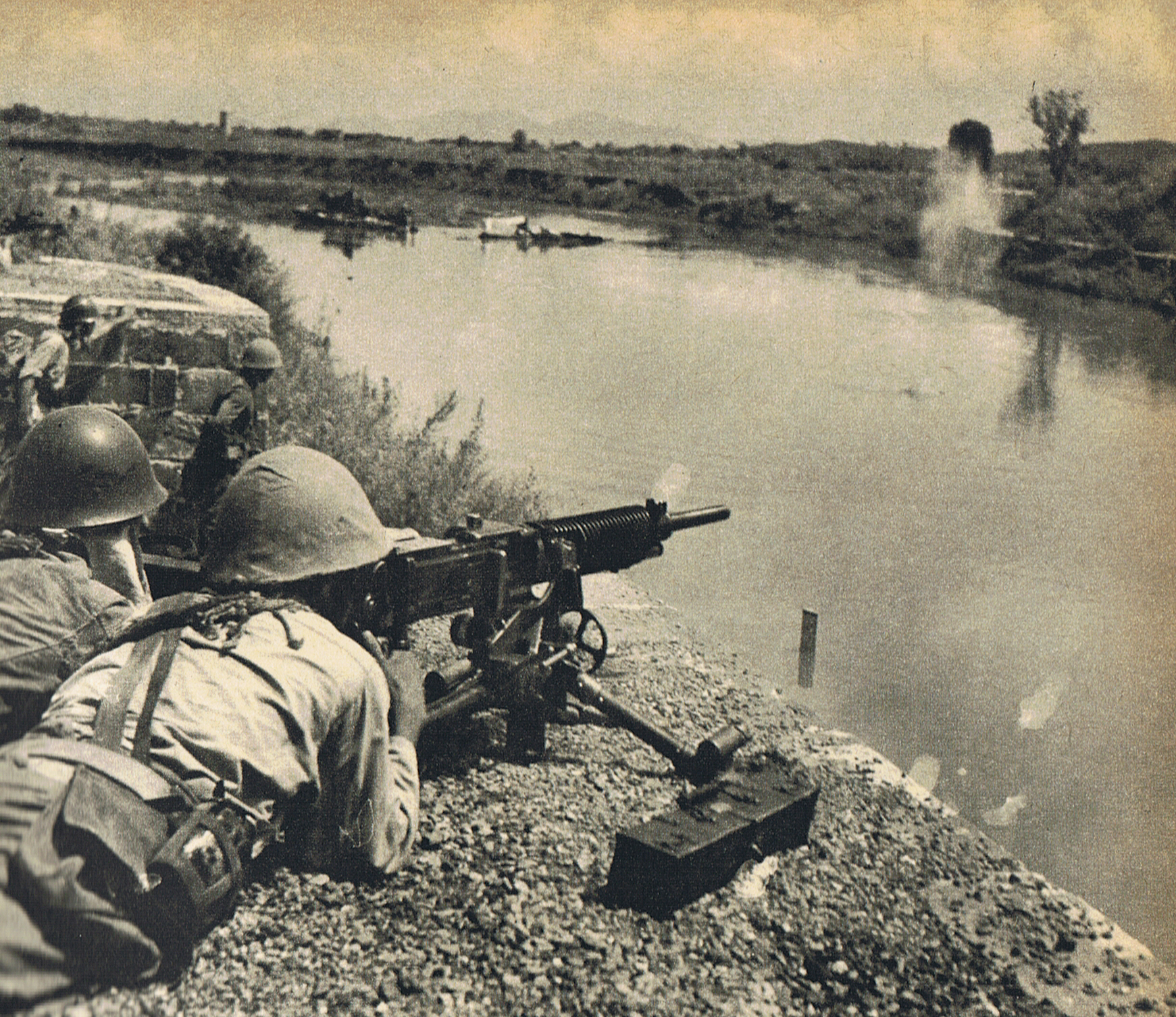 第一次長沙作戦で対岸の国府軍と交戦する第四師団の兵士。湖南省新市南方の同楽橋附近にて、昭和16年9月22～23日頃。 A soldier of the IJA 4th Division firing type 92 heavy machine gun during the 1st round of Chángshā operation. Near Miluo river (汨水), Húnán Province, China.